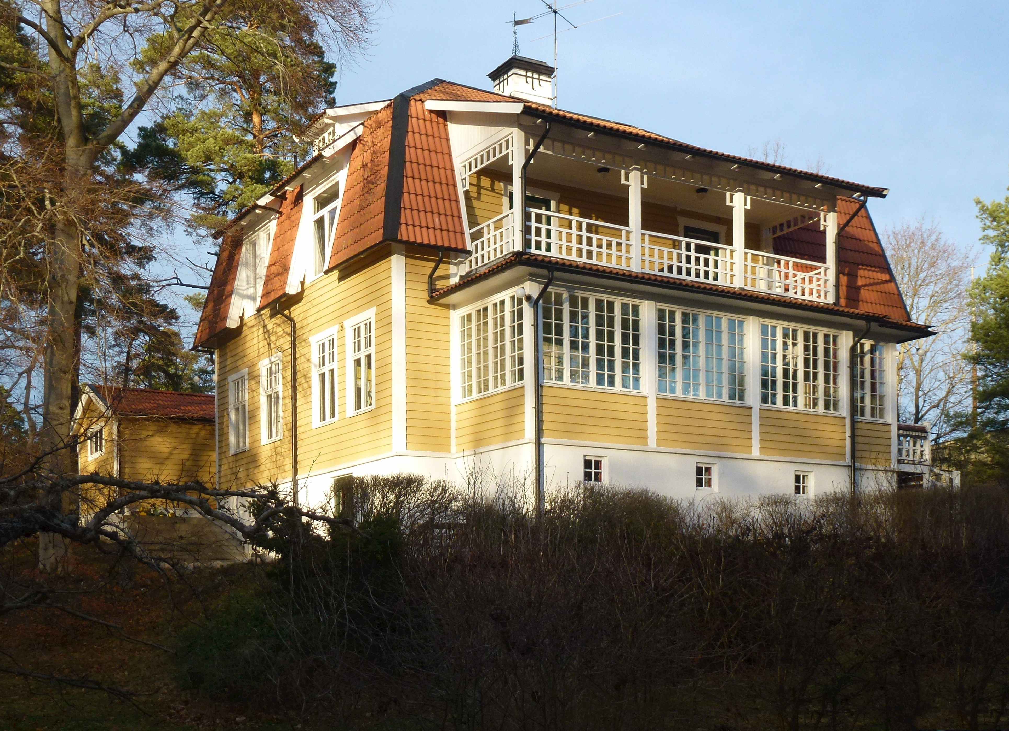 Villa Widstrand (även Villa Skoga), på f.d. Skogsvägen - idag Krokvägen 1 A. Byggnaden ritades av arkitekt Elis Bergh på uppdrag av bokförläggare Wilhelm Widstrand, som åren 1906 - 1922 var bosatt i villan.